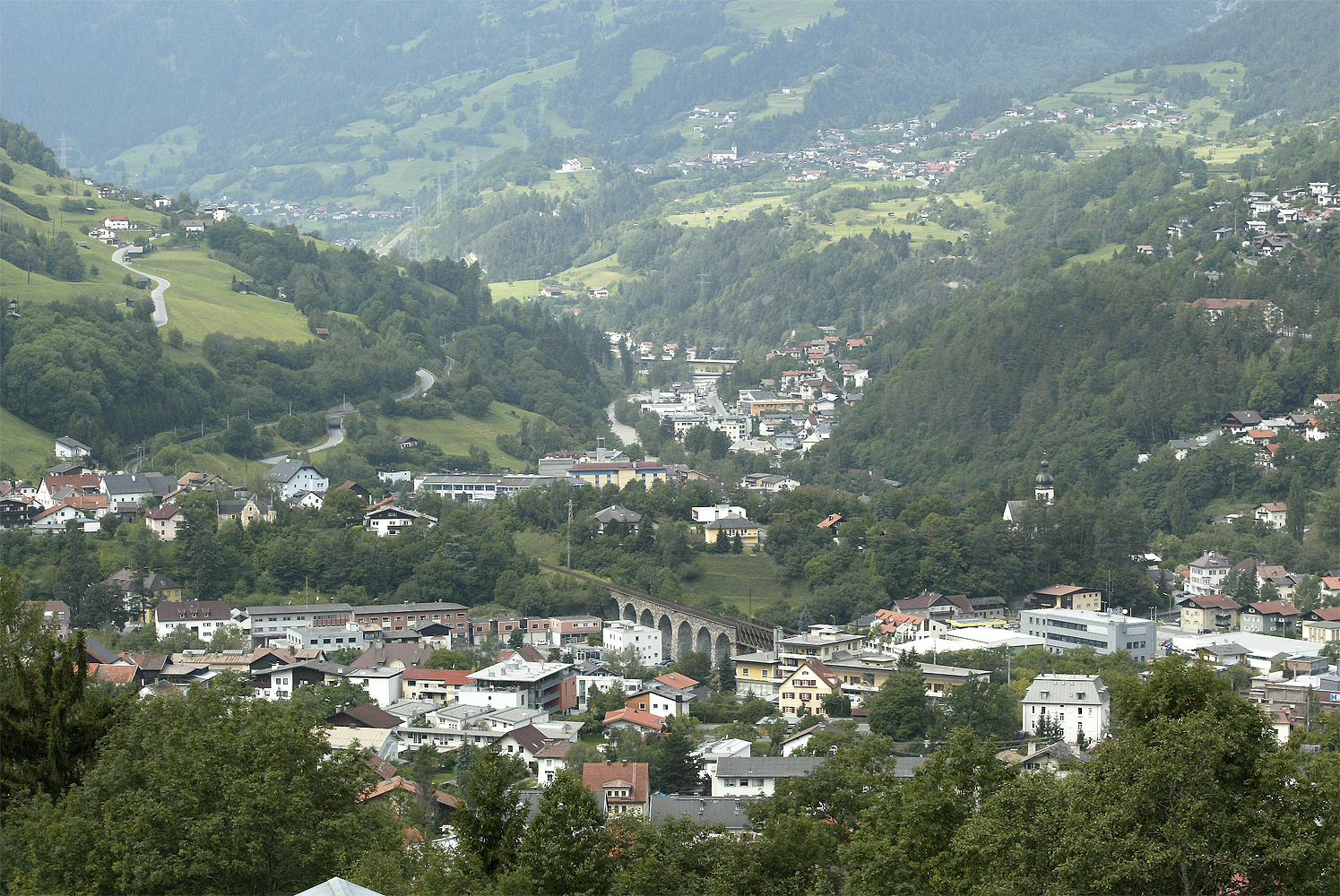 Stadtgemeinde Landeck in Tirol, Österreich. In der Bildmitte ist die Innbrücke der Arlbergbahn zu erkennen (Blick Richtung Westen)